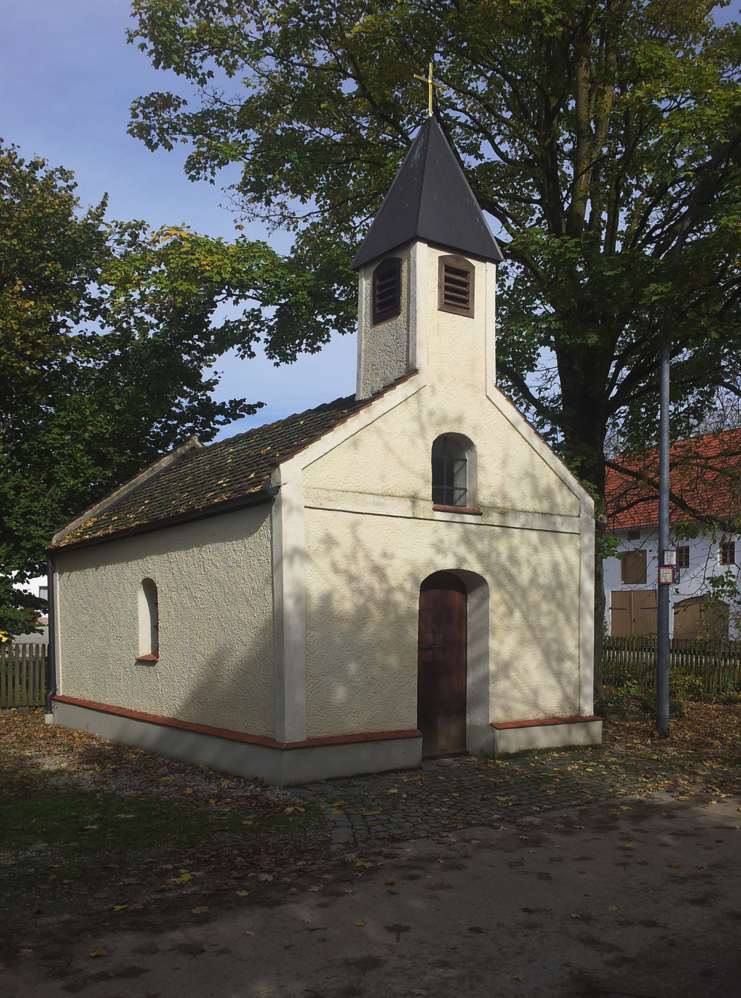 Kapelle in Pellhausen einem Ortsteil von Freising This is a photograph of an architectural monument.